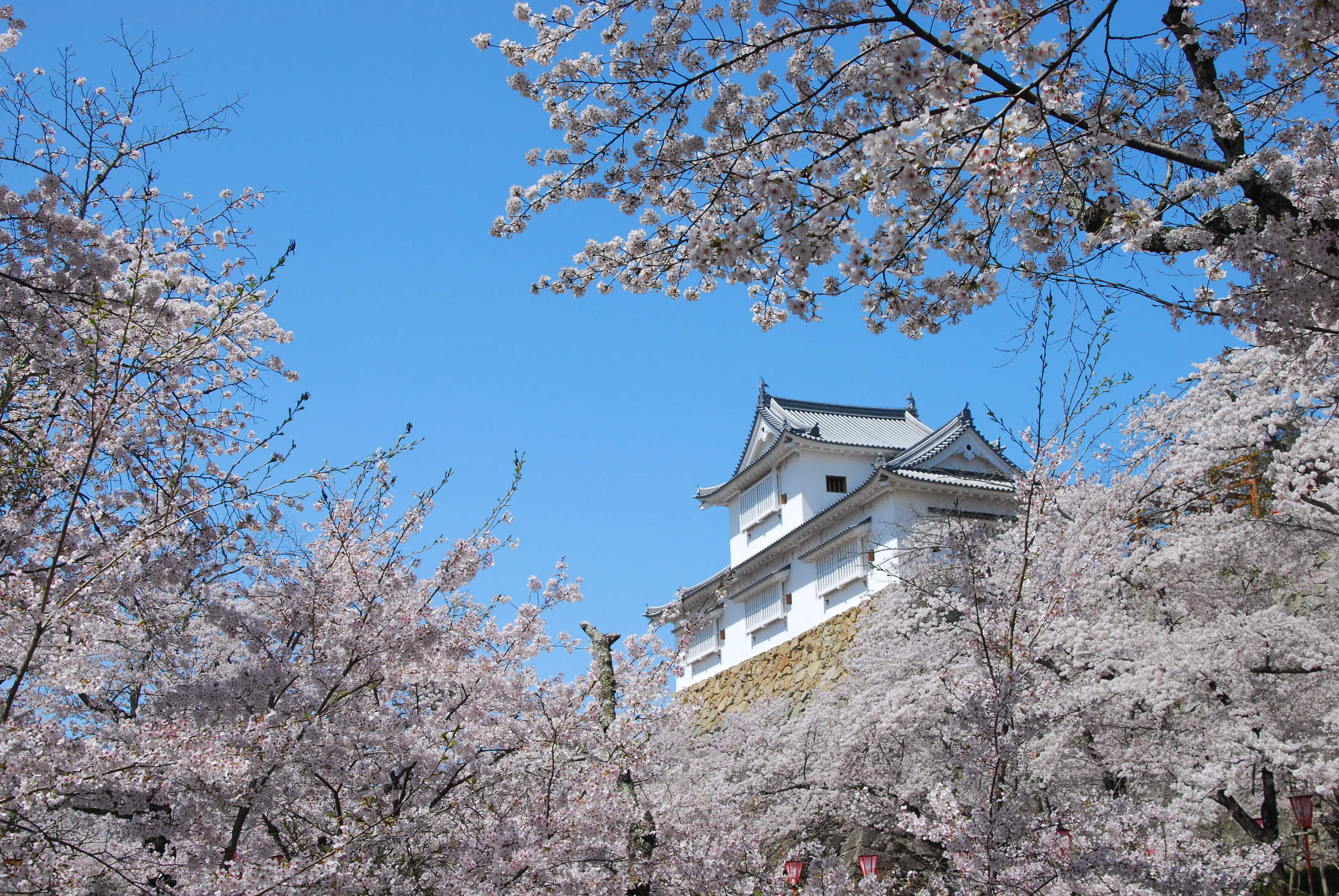 桜に囲まれた津山城、備中櫓の画像。